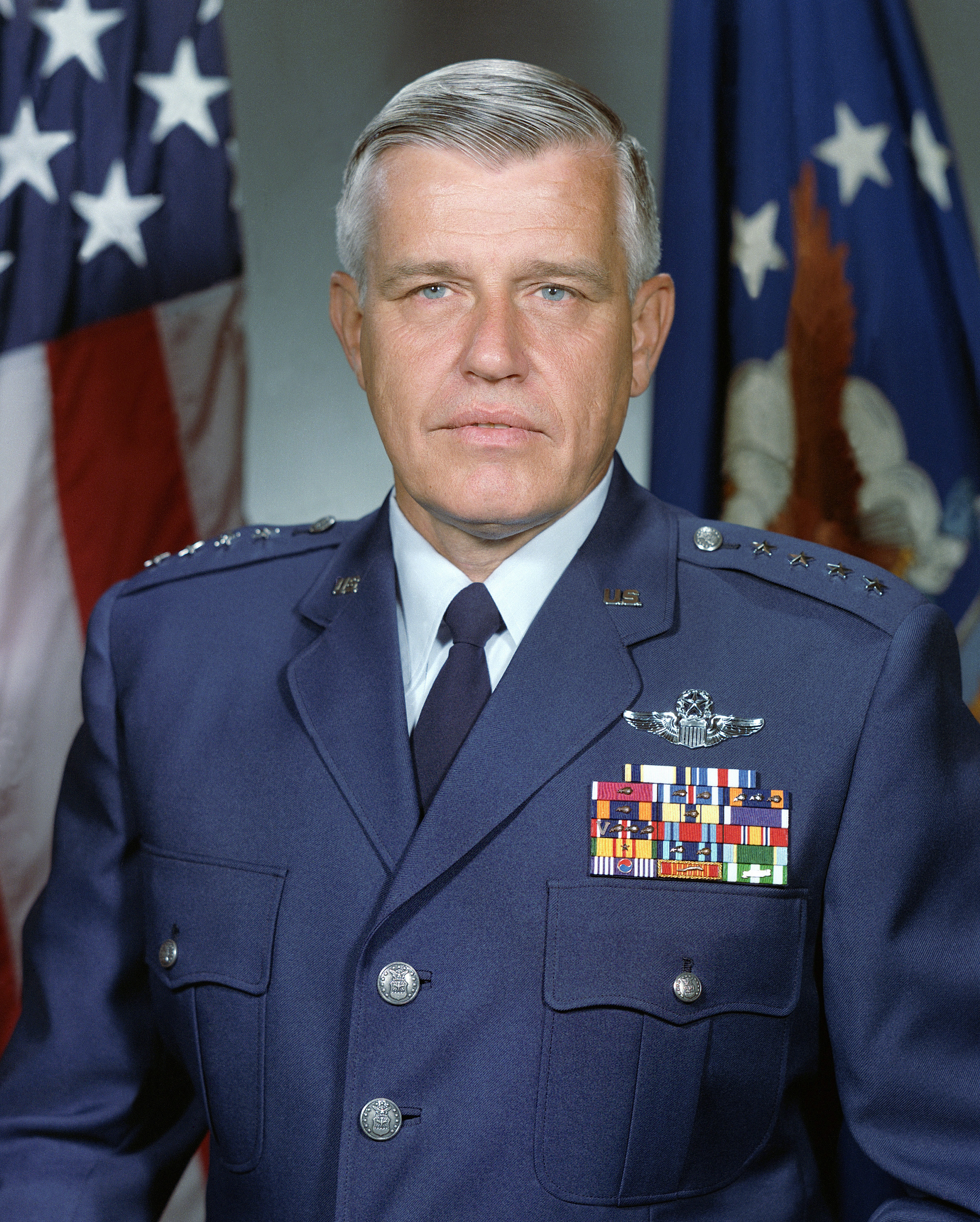 General Robert D. Russ